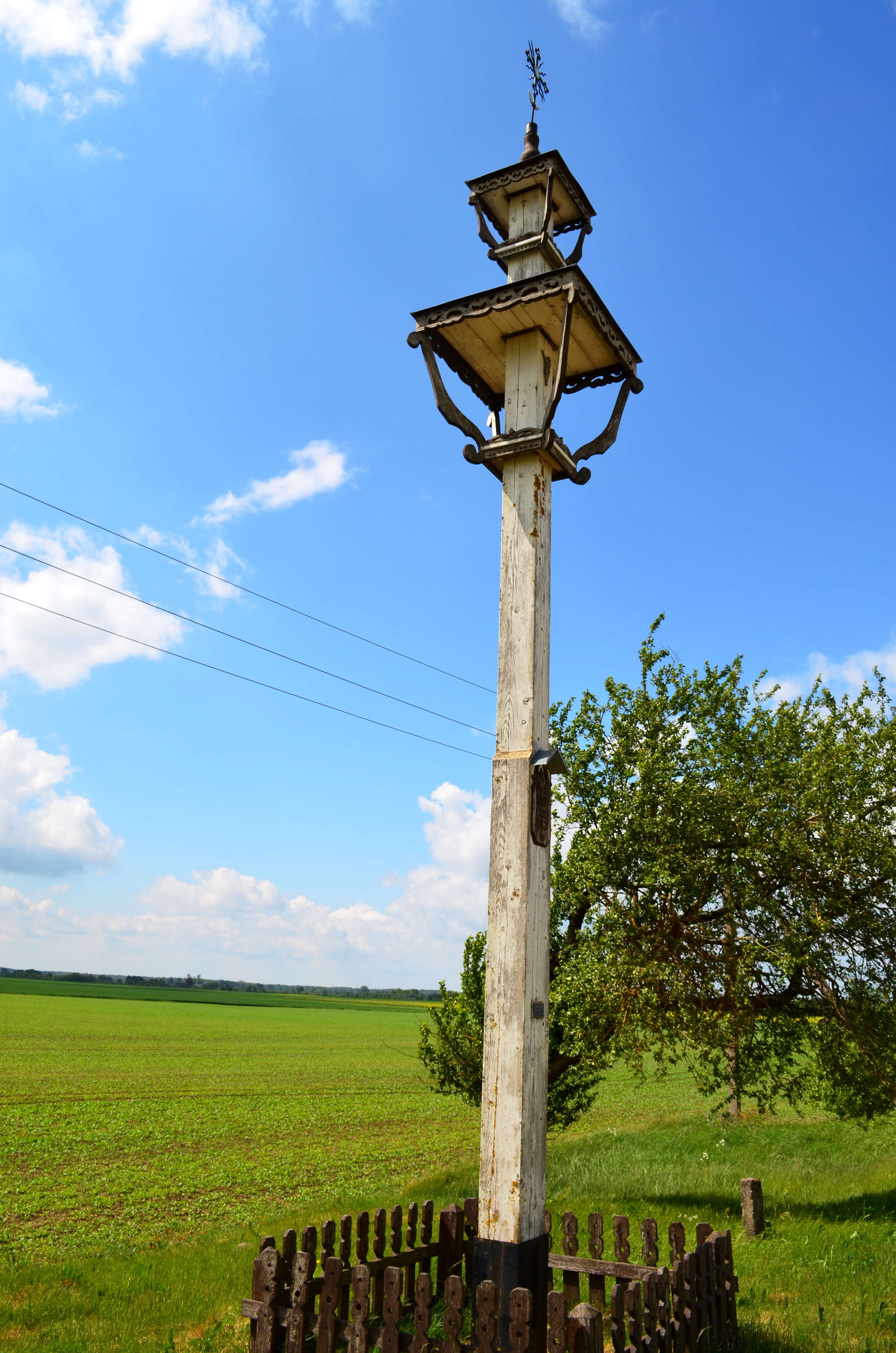 Stogastulpis, Miliešiškiai, Panevėžio raj.